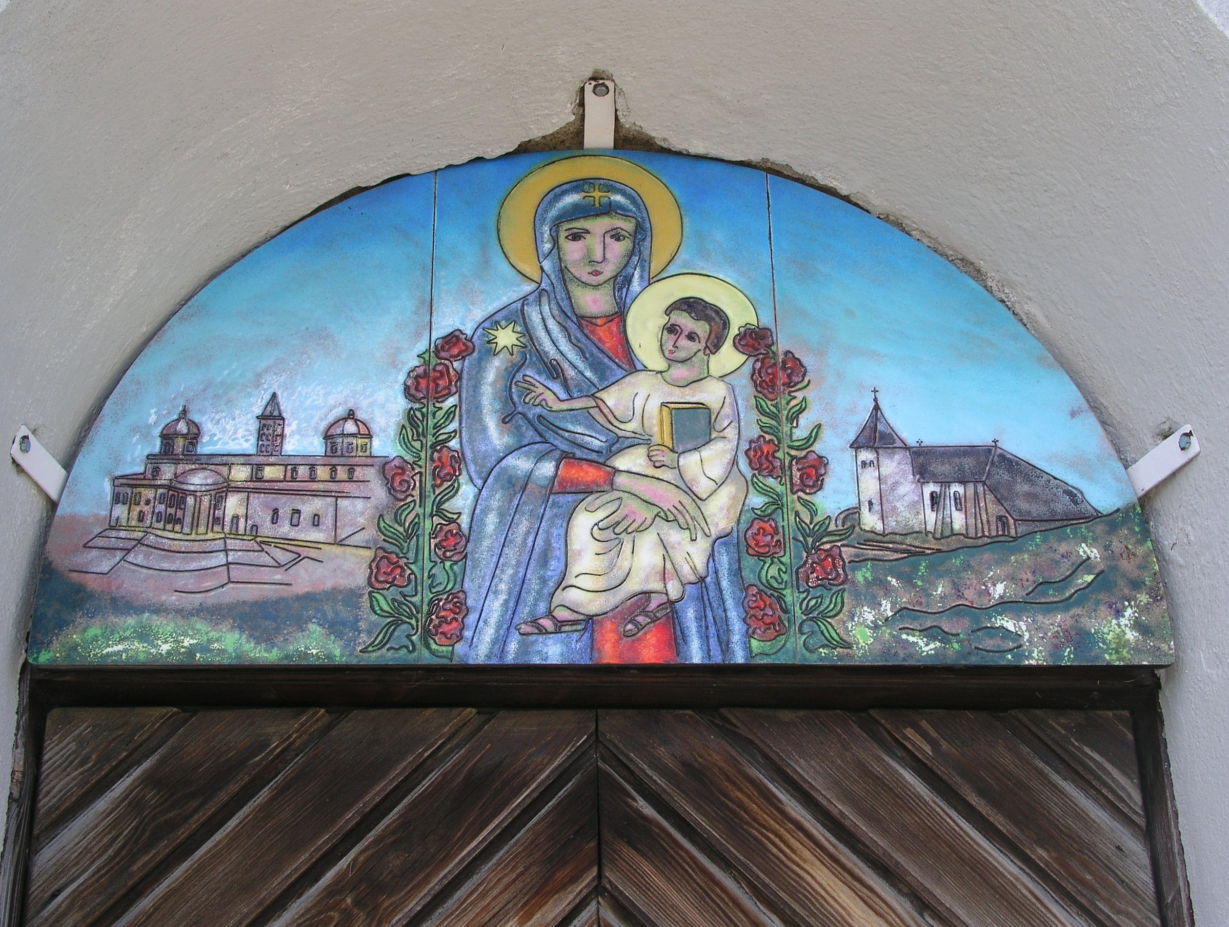 Maria mit Kind, Email-Bild von Br. Bernward Schmid OSB, Wallfahrtskirche Maria Schnee auf der Hochalm; eigene Aufnahme des Autors